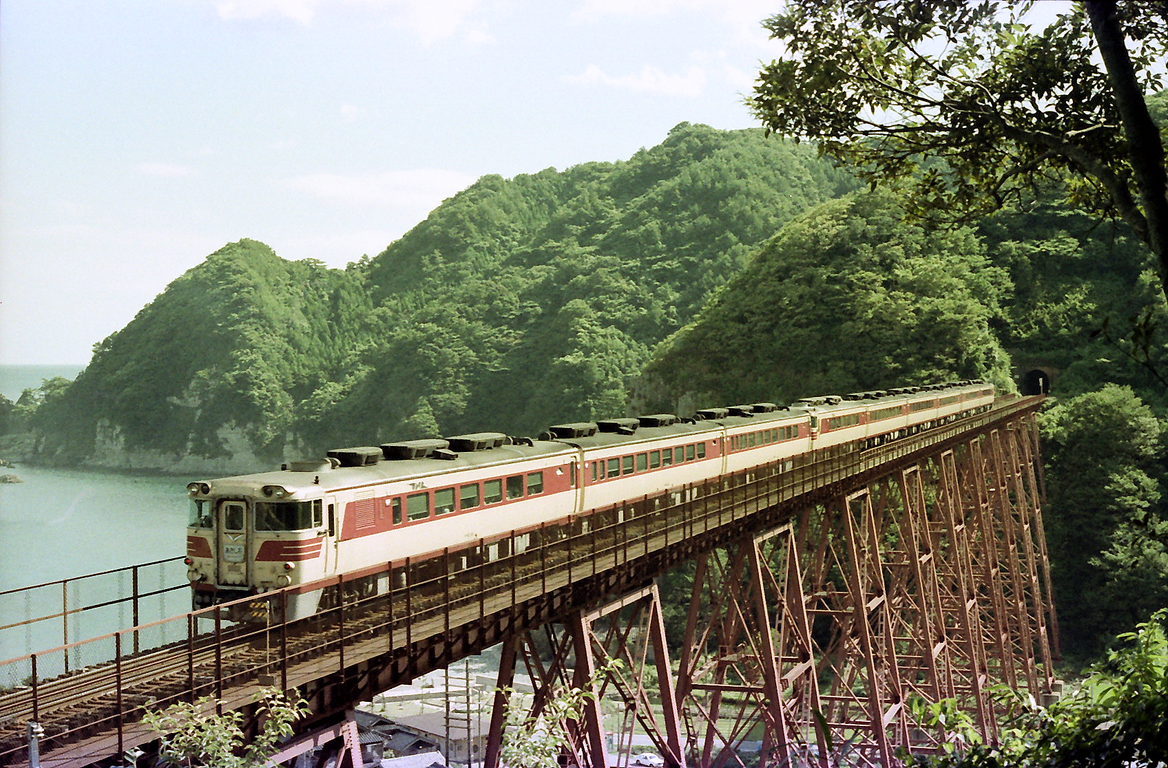 特急「あさしお」